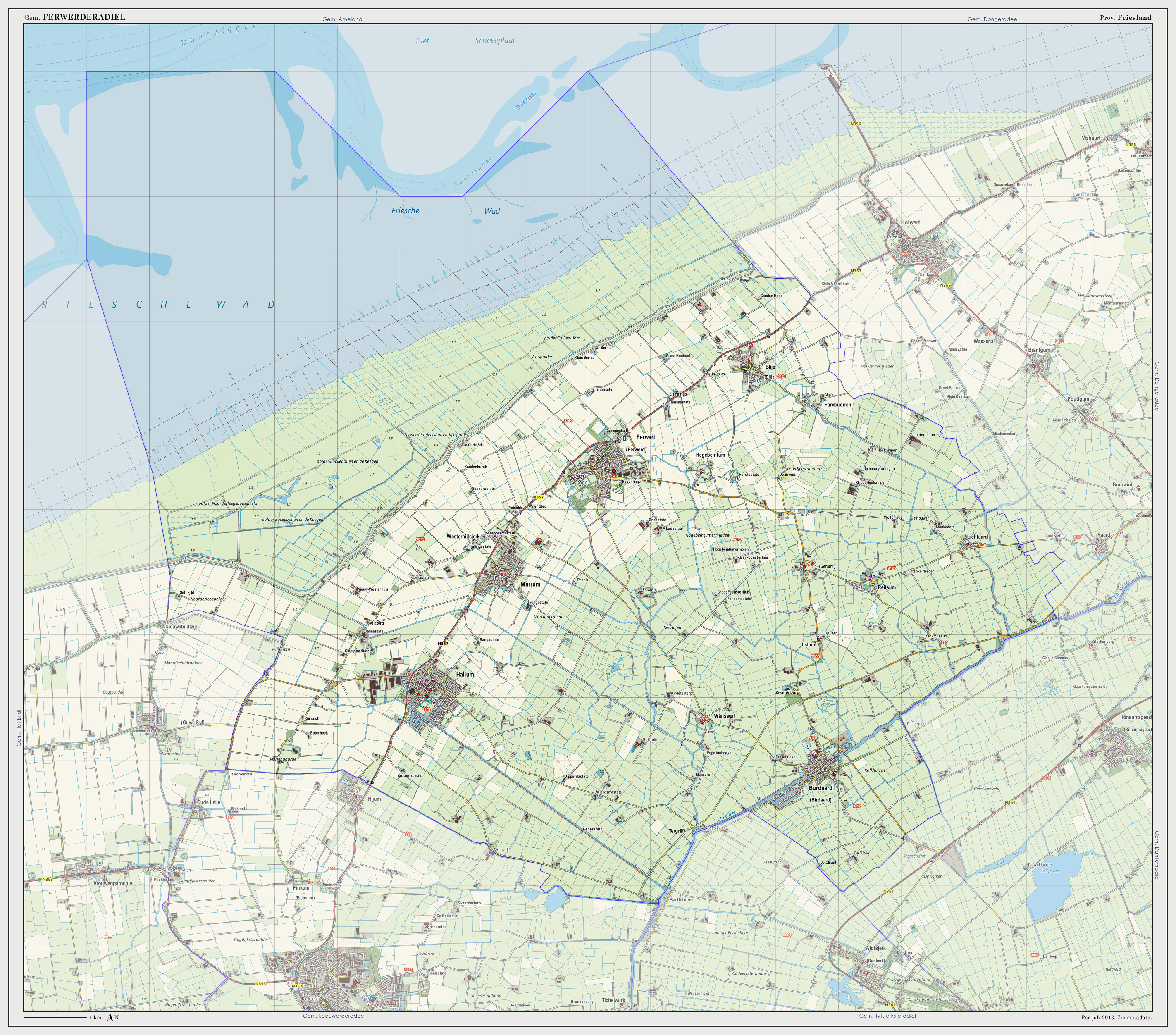 Topografische kaart van gemeente Ferwerderadiel (2013). Samengesteld door Jan-Willem van Aalst op basis van de GML open geodata van de BRT/Top10NL (basisregistratie Topografie, Kadaster 2011), vrijgegeven door Kadaster onder de Creative Commons BY licentie. Additionele gegevens uit BAG (8 juli 2013), uit de Open Street Map (9 juli 2013) en uit de Risicokaart. Peildatum kaartbeeld: 9 juli 2013. Zie ook Gemeentenatlas.nl Samenstelling en kleurenschema: Jan-Willem van Aalst, met QuantumGIS en Photoshop. Zie ook de Legenda.